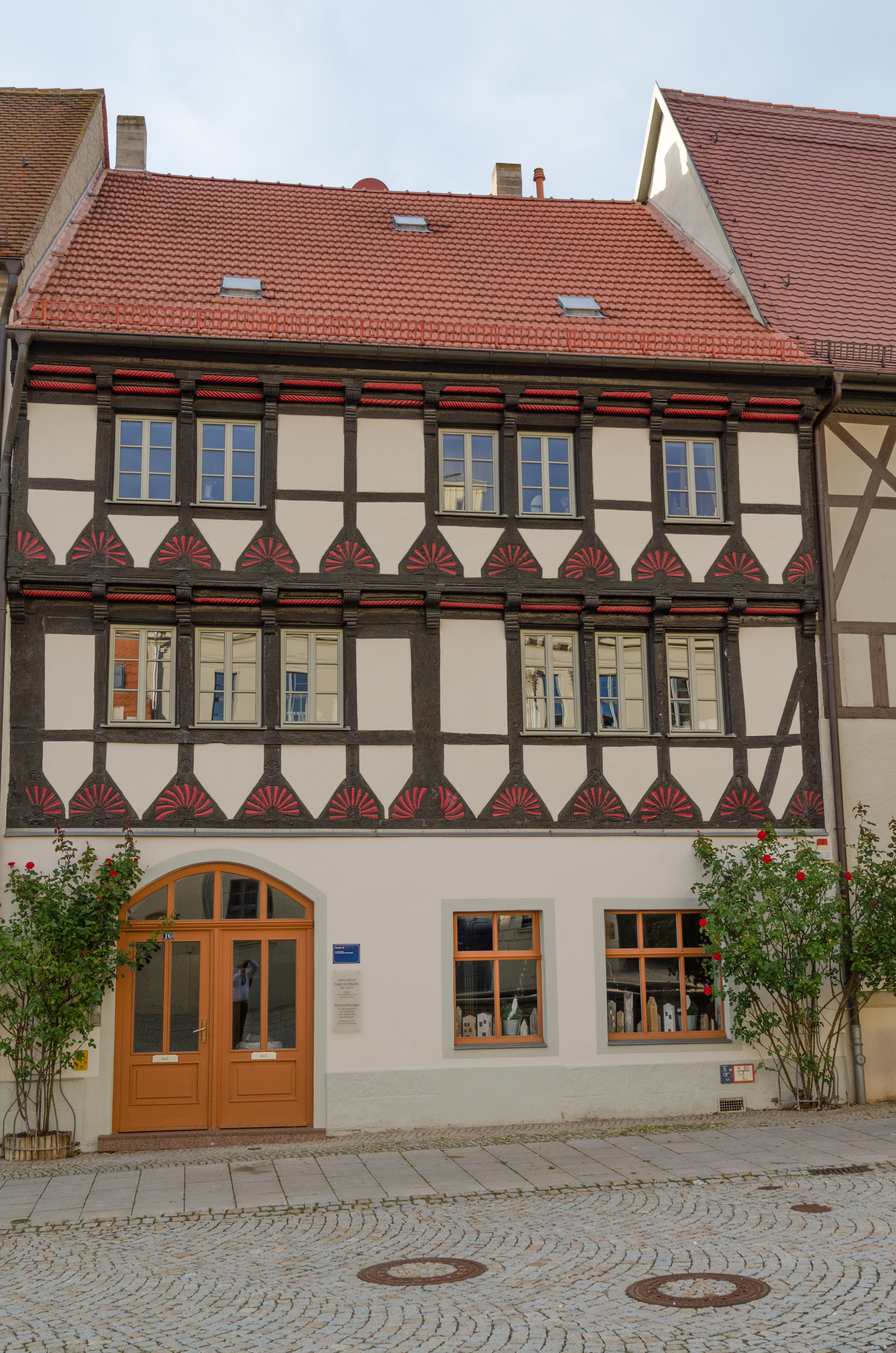 Sangerhausen, Markt 10